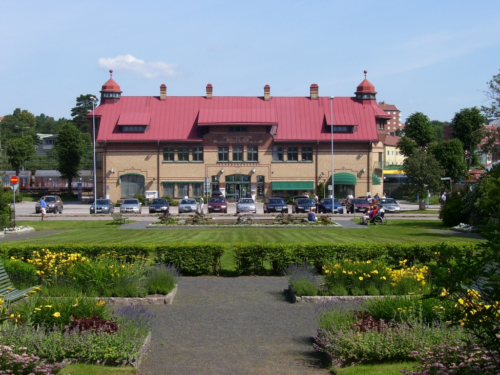 Uddevalla Central Station, Sweden (Uddevalla centralstation)